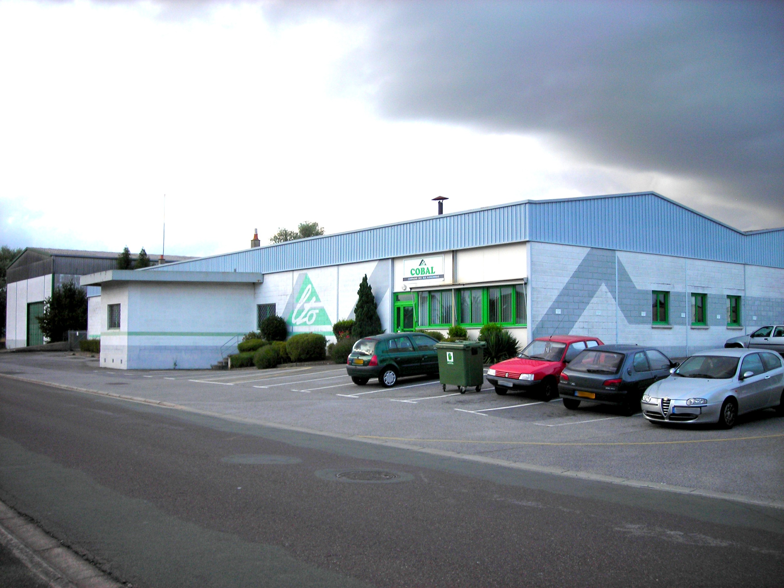 Dépôt des bus du réseau Alto (Orne, France)